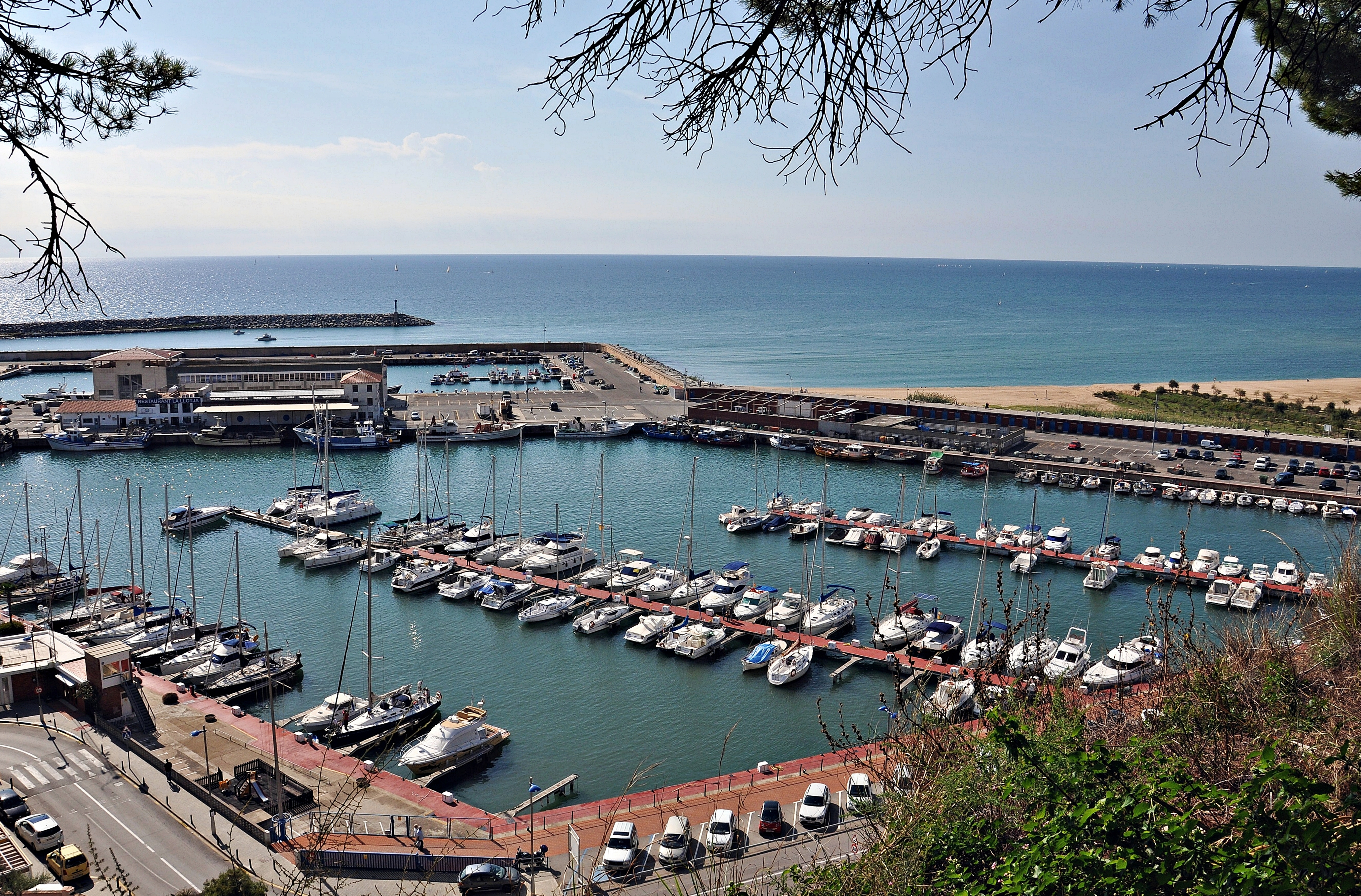 maresme-cataluña